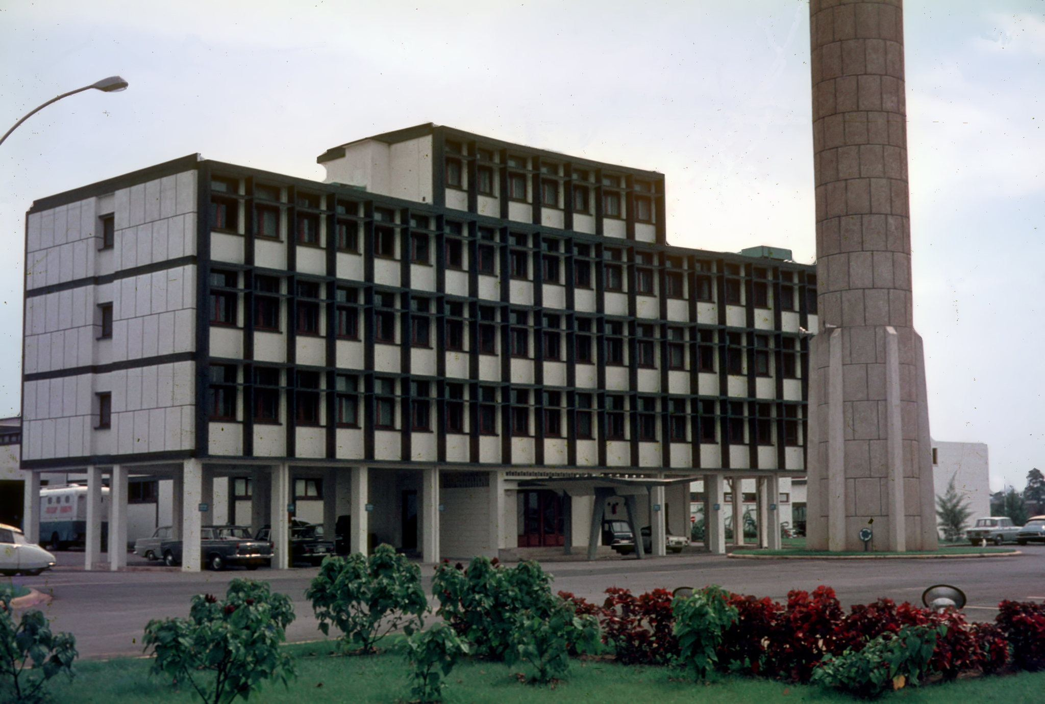 En 1965 la RTI possédait déjà de beaux bâtiments climatisés